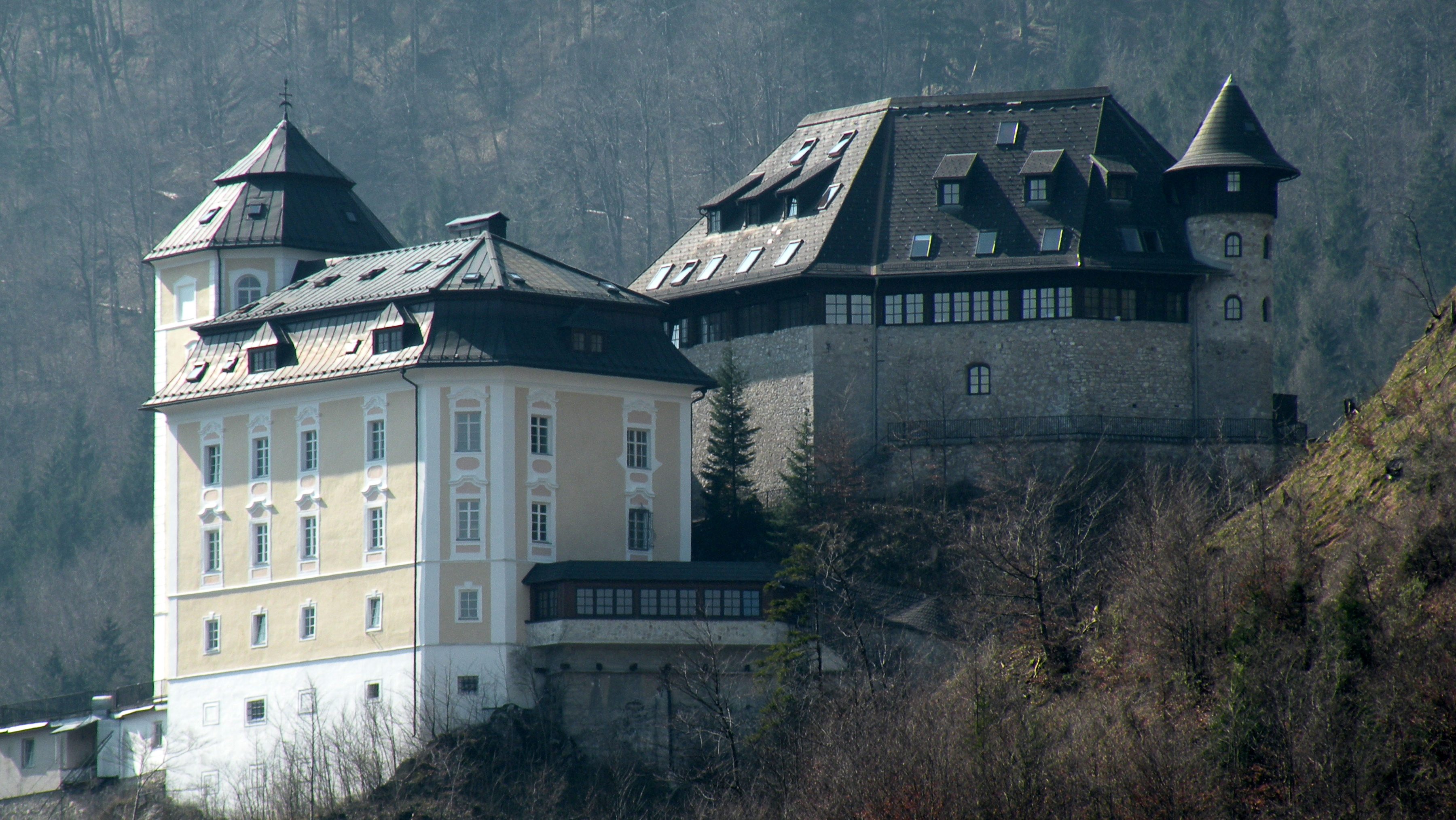 Schloss Klaus in Oberösterreich